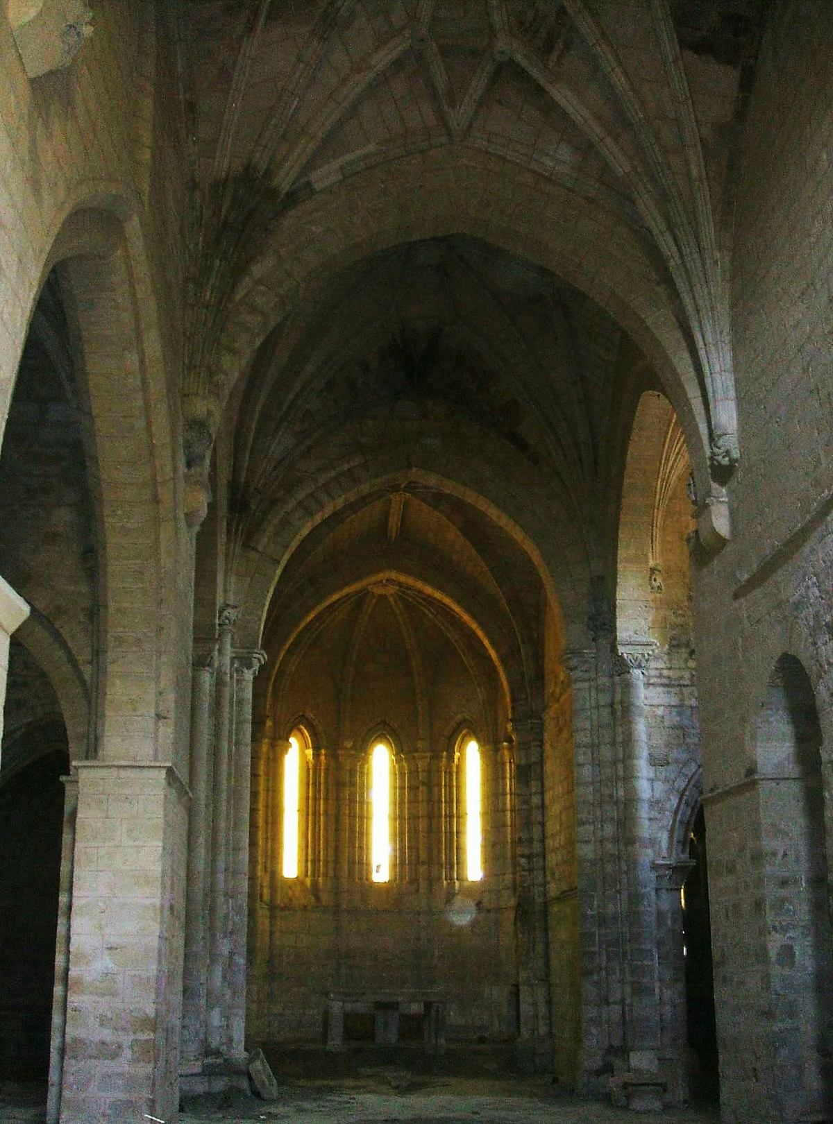 Iglesia del antigo monasterio premonstratense de Santa Cruz de Ribas (Palencia, España)